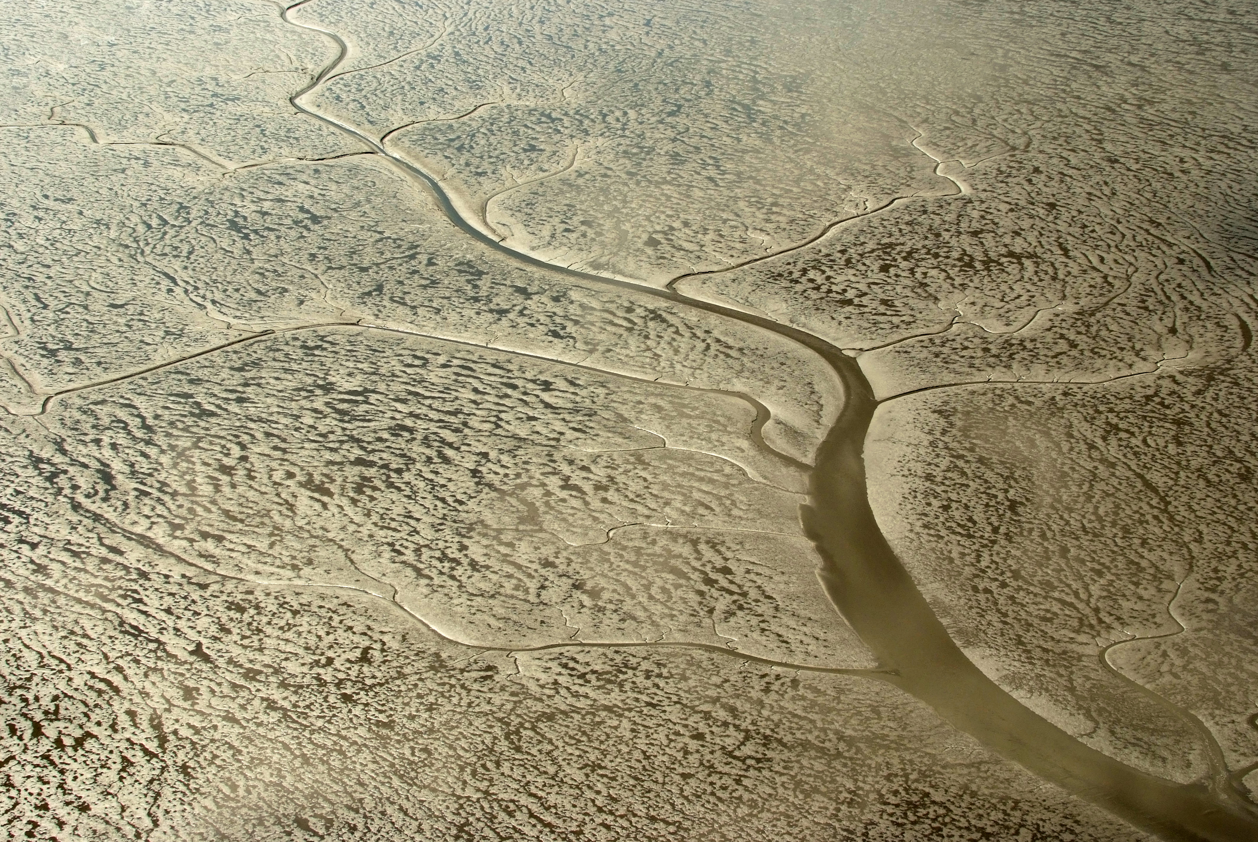 Fotoflug vom Flugplatz Nordholz-Spieka über Bremerhaven, Wilhelmshaven und die Ostfriesischen Inseln bis Borkum Priel im Wattenmeer an der Nordseeküste